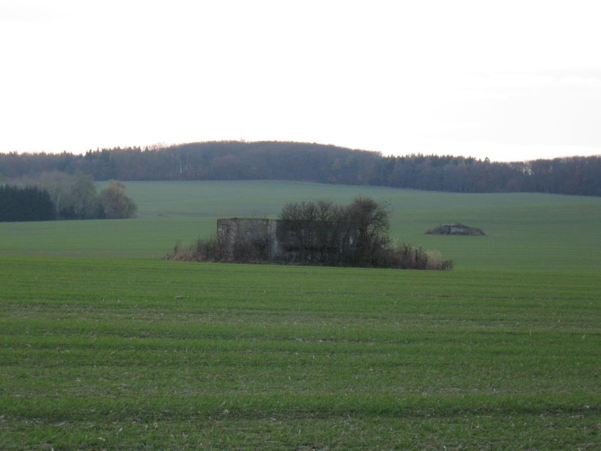 Betonové bunky, které byly postaveny za 2. světové války v rozšířeném vojenském výcvikovém prostoru Vyškov (Truppenübungsplatz Wischau). Betonové pozorovatelny u Ruprechtova